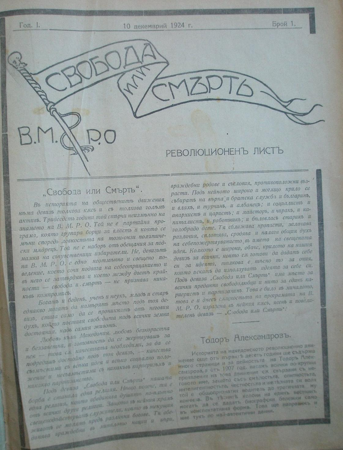 Вестникът на ВМРО "Свобода или смърт".